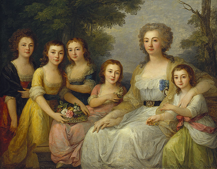 Александра Петровна (р. 1774 г., ум. 1842 г.), в замужестве за князем Алексеем Андревичем Голицыным Екатерина Петровна (р. 1775 г., ум. 1826 г.), в замужестве за графом Фёдором Ростопчиным, и Ростопчин при жизни Екатерины весьма пользовался покровительством тетушки. Варвара Петровна, умершая в девицах Вера Петровна (ум. 1814 г.), в замужестве, за Иларионом Васильевичем Васильчиковым, впоследствии князем Анна Петровна, бывшую потом за гр. Варфоломеем Васильевичем Толстым